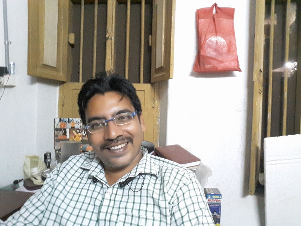 నాట‌క ర‌చ‌యిత‌, ద‌ర్శ‌కుడు : విద్యాధ‌ర్ మునిప‌ల్లె